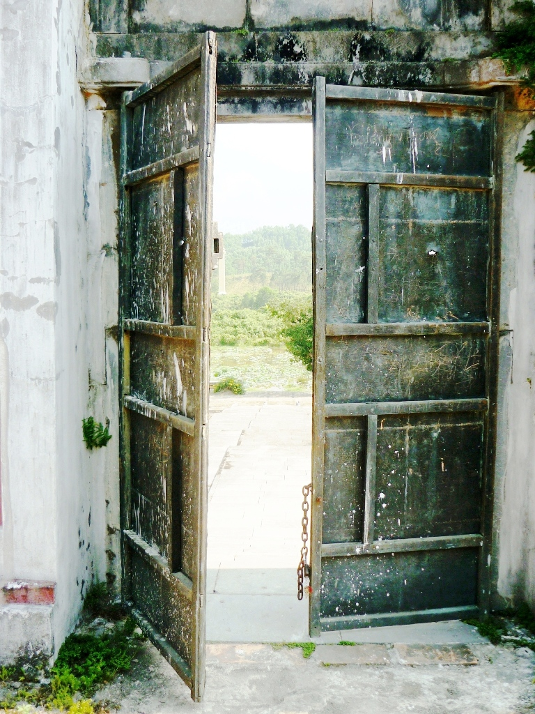 Thể Loại:Lăng tẩm Huế Thể Loại:Di tích cố đô Huế Thể loại:Lăng tẩm các Vua chúa Nguyễn Thể loại:Di tích ngoài Kinh Thành Huế